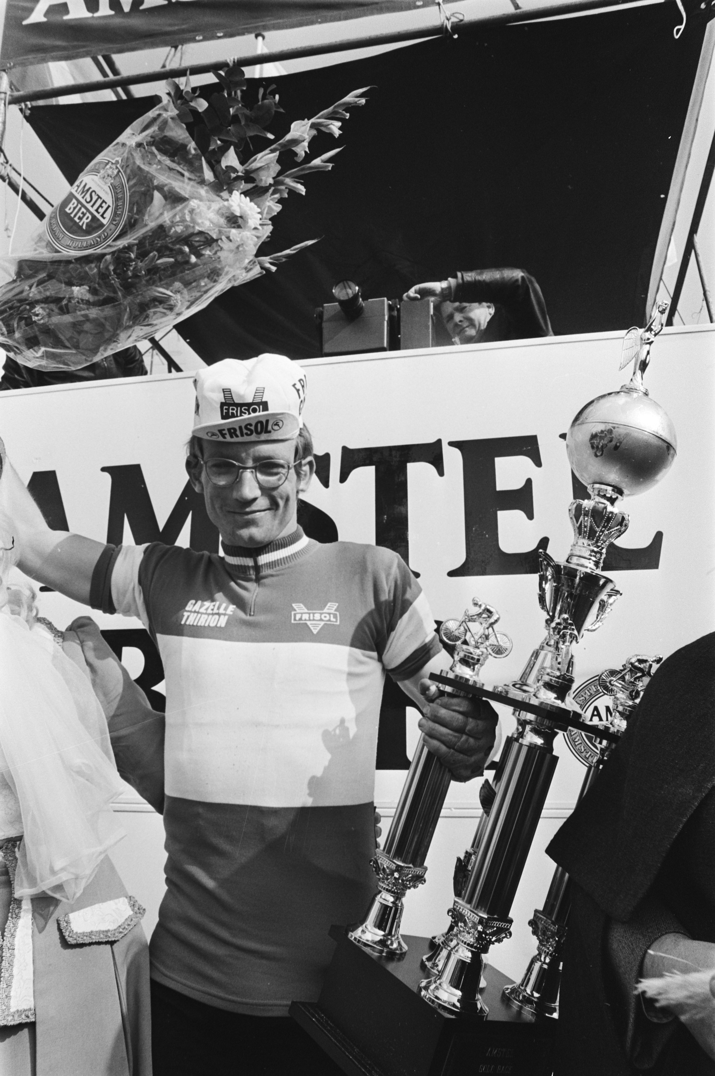 Collectie / Archief : Fotocollectie Anefo Reportage / Serie : Amstel Gold Race 1977 Beschrijving : Winnaar Jan Raas tijdens de huldiging Datum : 9 april 1977 Trefwoorden : huldigingen, sport, wielrennen Persoonsnaam : Raas, Jan Fotograaf : Verhoeff, Bert / Anefo Auteursrechthebbende : Nationaal Archief Materiaalsoort : Negatief (zwart/wit) Nummer archiefinventaris : bekijk toegang 2.24.01.05 Bestanddeelnummer : 929-1167